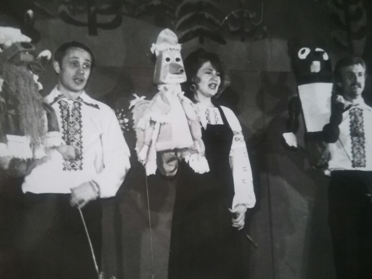 Людмила Безель в Ляльковому театрі